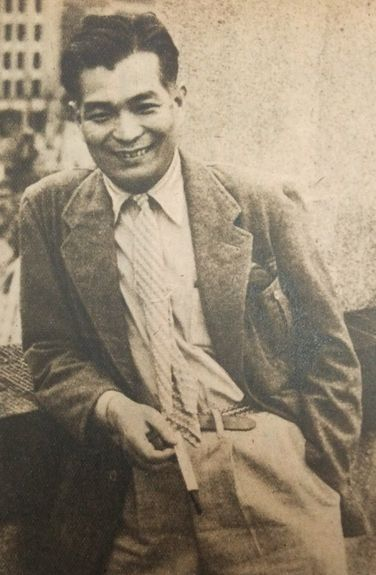 中野忠晴